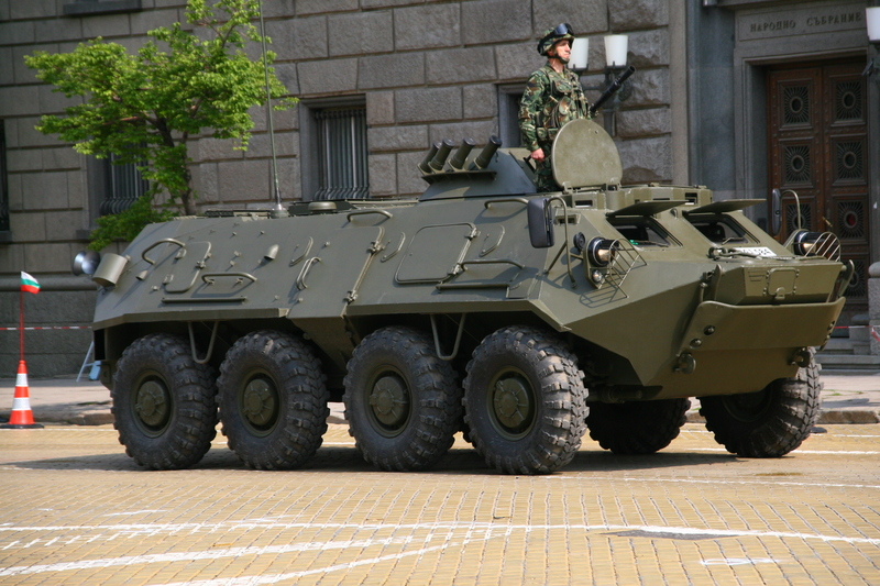 Модернизиран български БТР-60ПБ-МД1 по време на парадът за Гергьовден